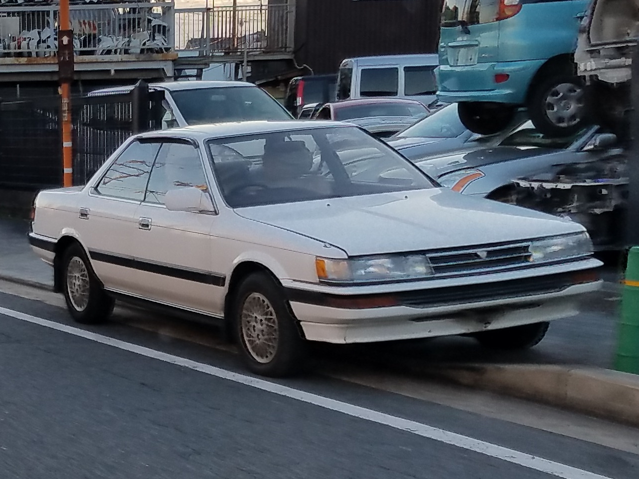 ビスタ ハードトップ 2.0VX(前期型)